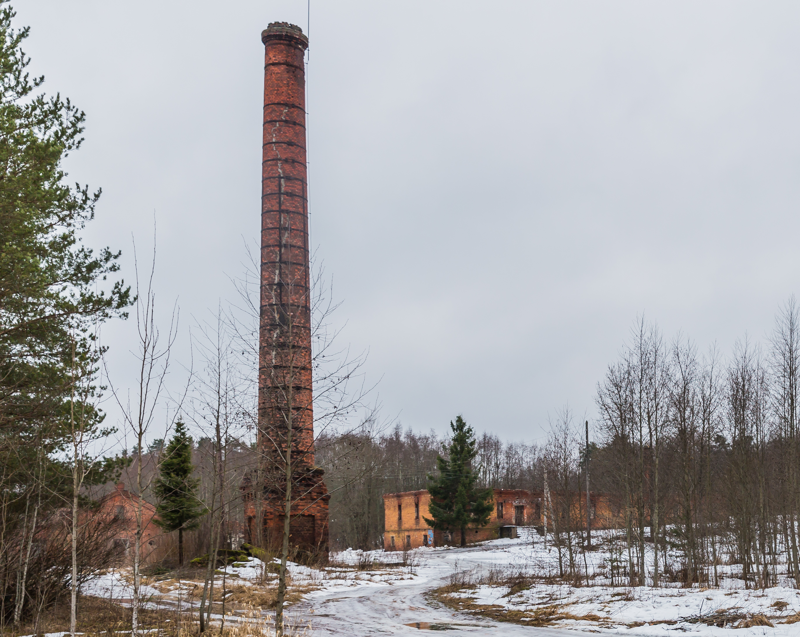 Savikon tiilitehtaan rauniot, Savikko, Perkjärvi